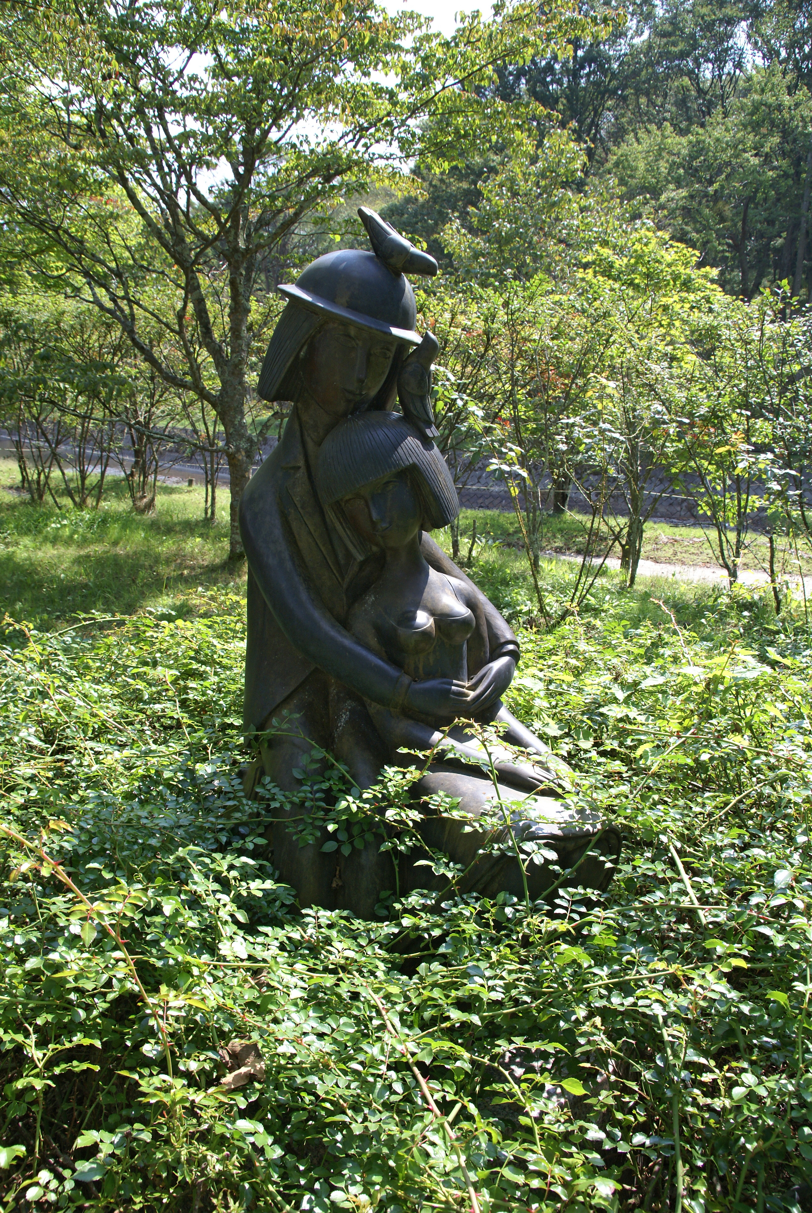 Peynet Museum in Karuizawa, Nagano, Japan